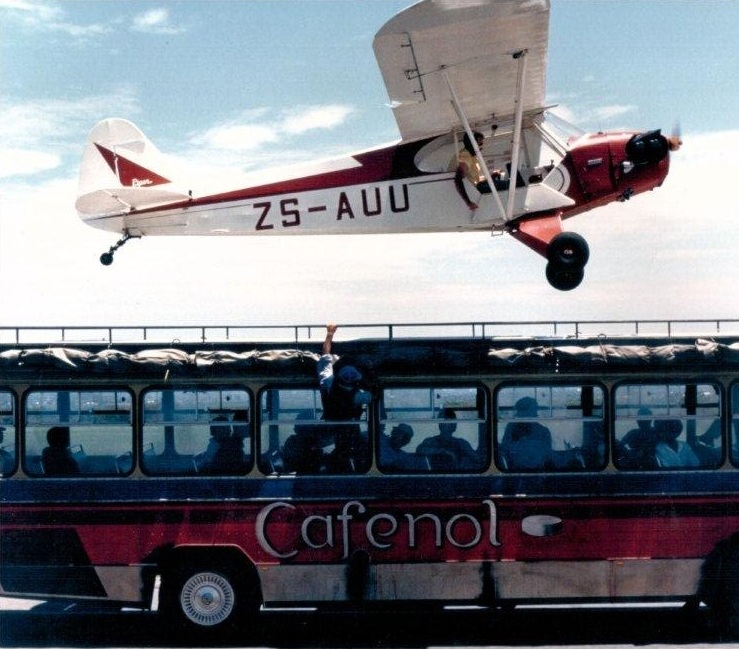 פעלול בסרט של שלח אפריקה 1986 צילום דויד גור (2)